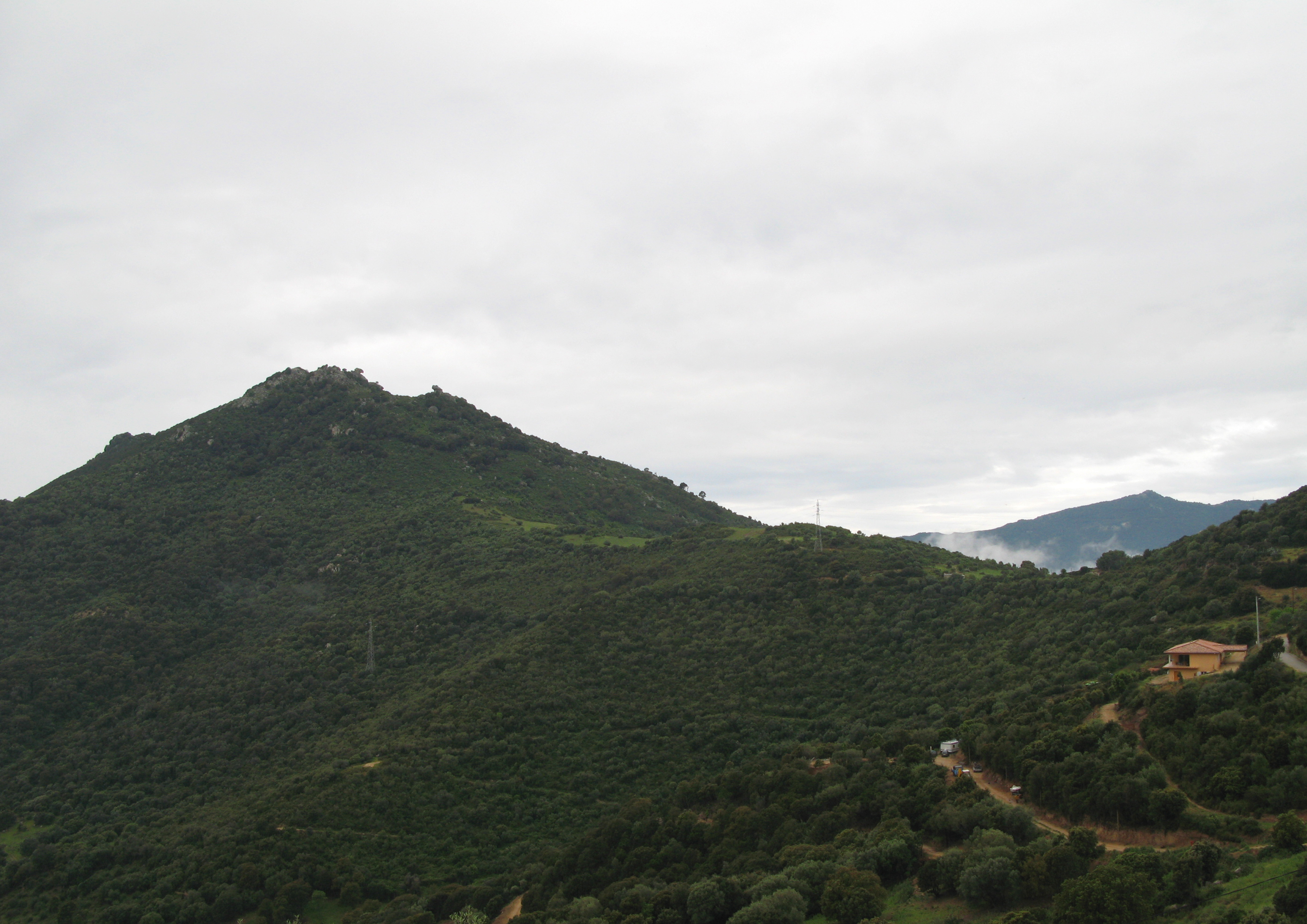 Arbellara (Corse-du-Sud, France) On aperçoit sur le bord droit la première maison du village. Un pylône se dresse à mi-hauteur du mont : une ligne électrique descend du village (à droite) dans la vallée (à gauche). Le nuage blanc atteste de la fraîcheur relative de cette matinée de printemps et de l'humidité de l'air, vu la pluie tombée au petit matin ou dans la nuit.